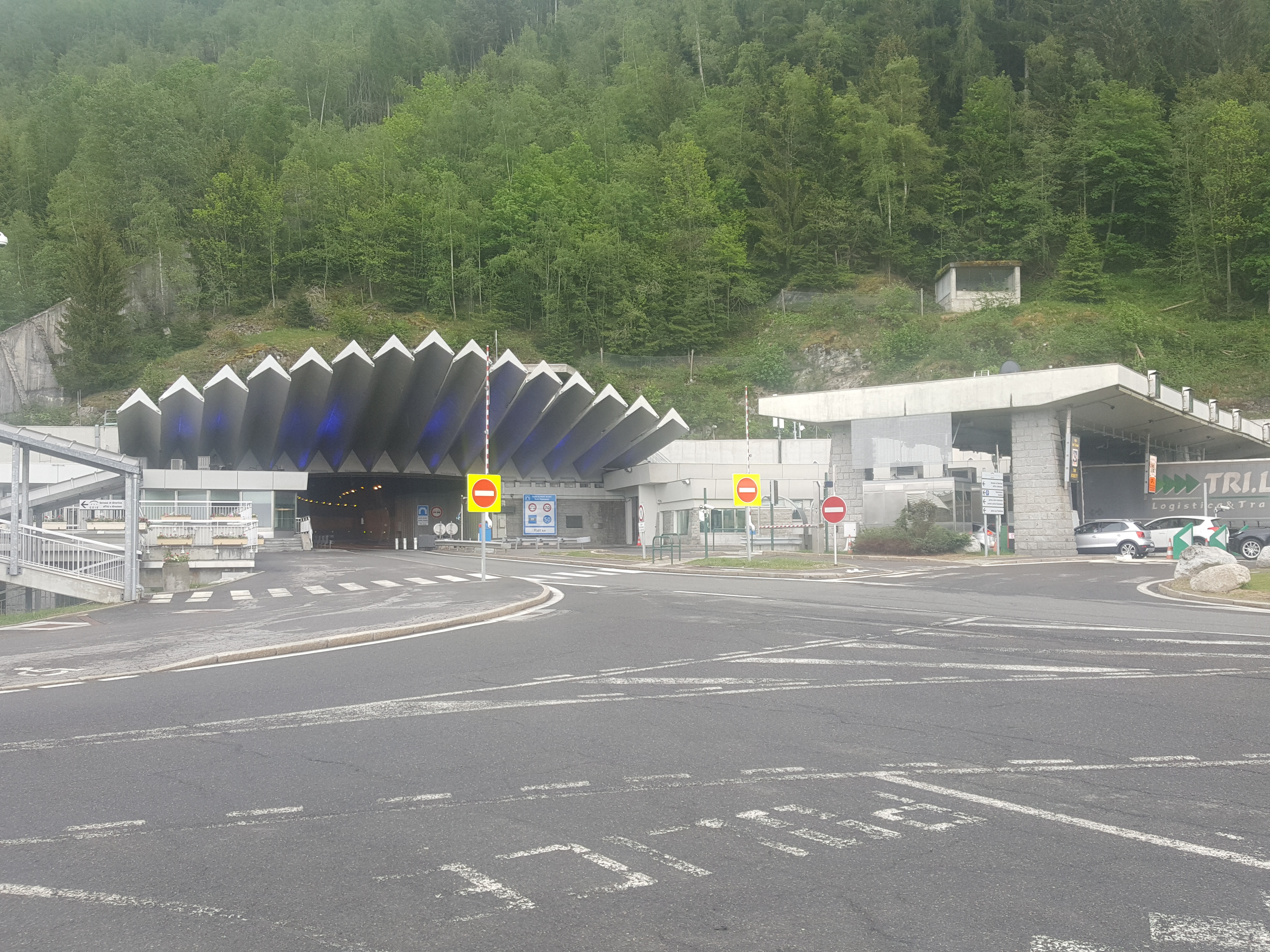 Tunnelausgang Mont Blanc, französische Seite